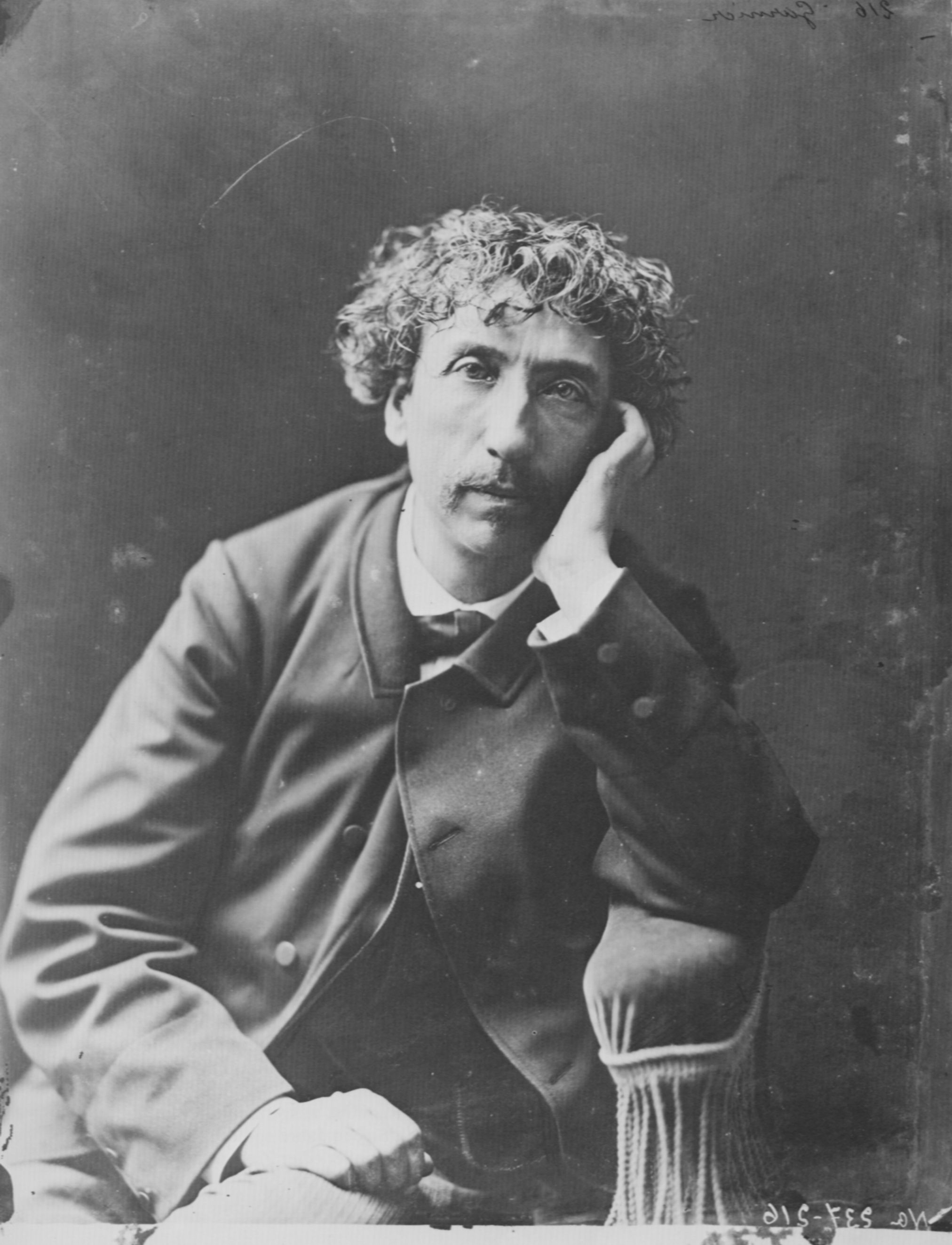 Tournachon, Gaspard-Félix: Charles Garnier (1825-1898)